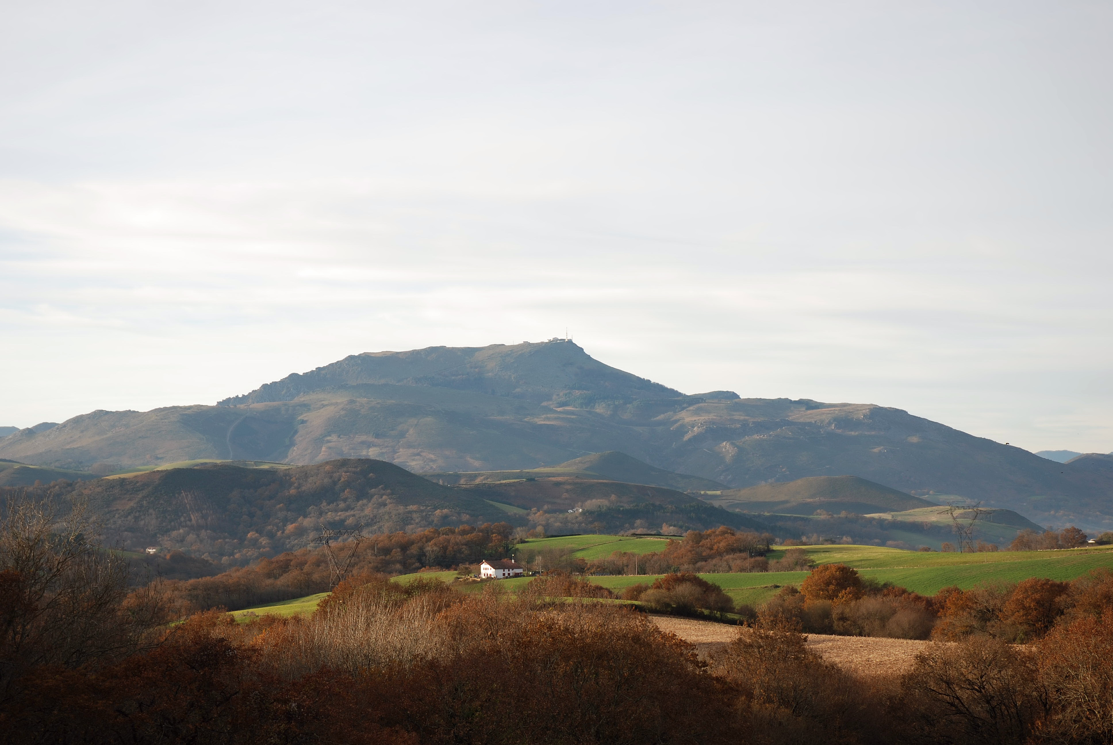 La Rhune vue d'Ahetze, photo prise le 31/12/06 par Harrieta171